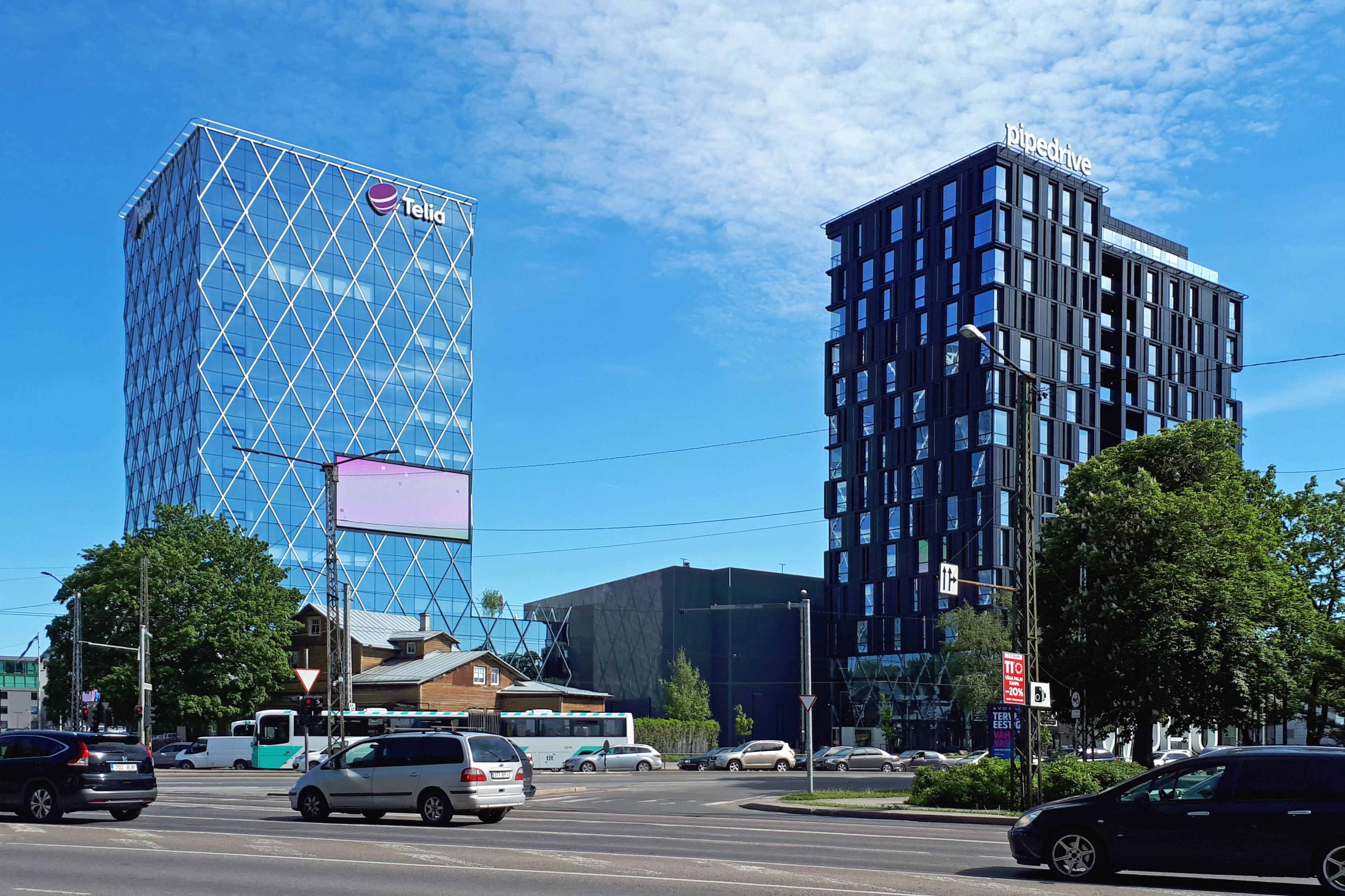 Перекрёсток Палдиского шоссе, улиц Эндла и Мустамяэ. Таллин, район Кристийне